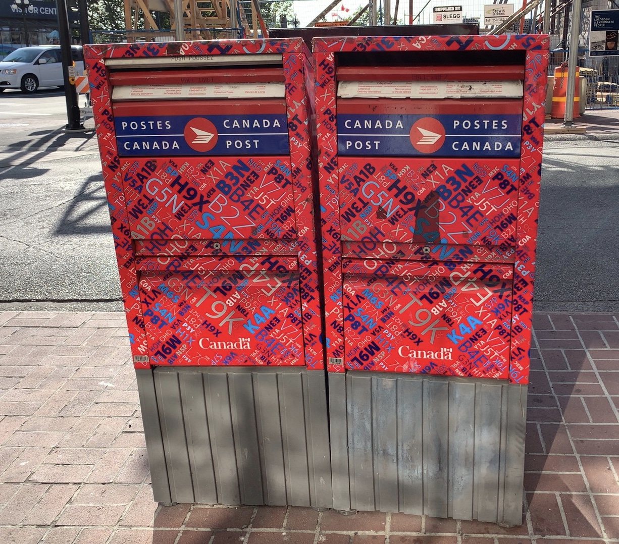 August 19, 2019 17:37 photograph